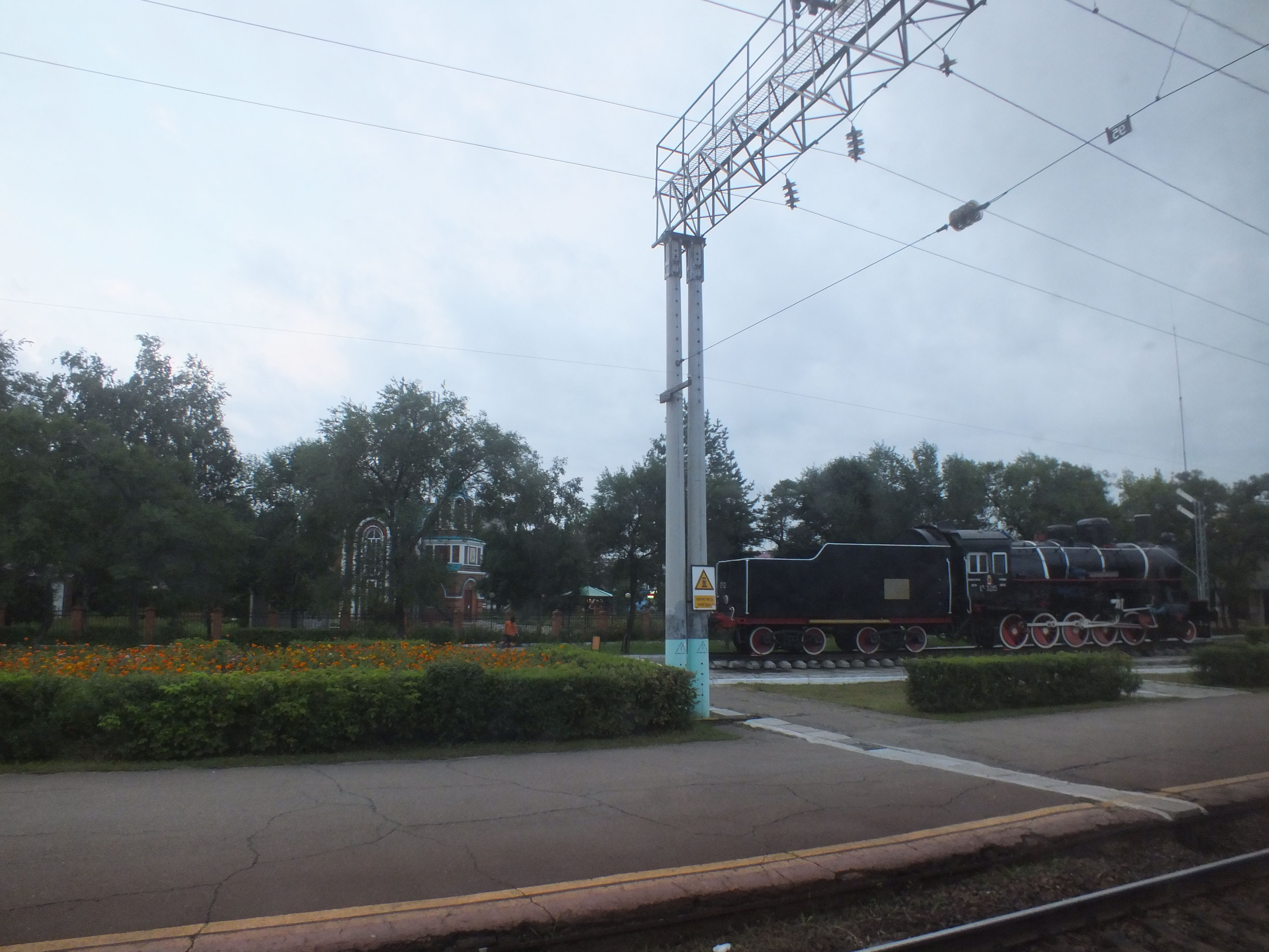 Russian locomotive class Е